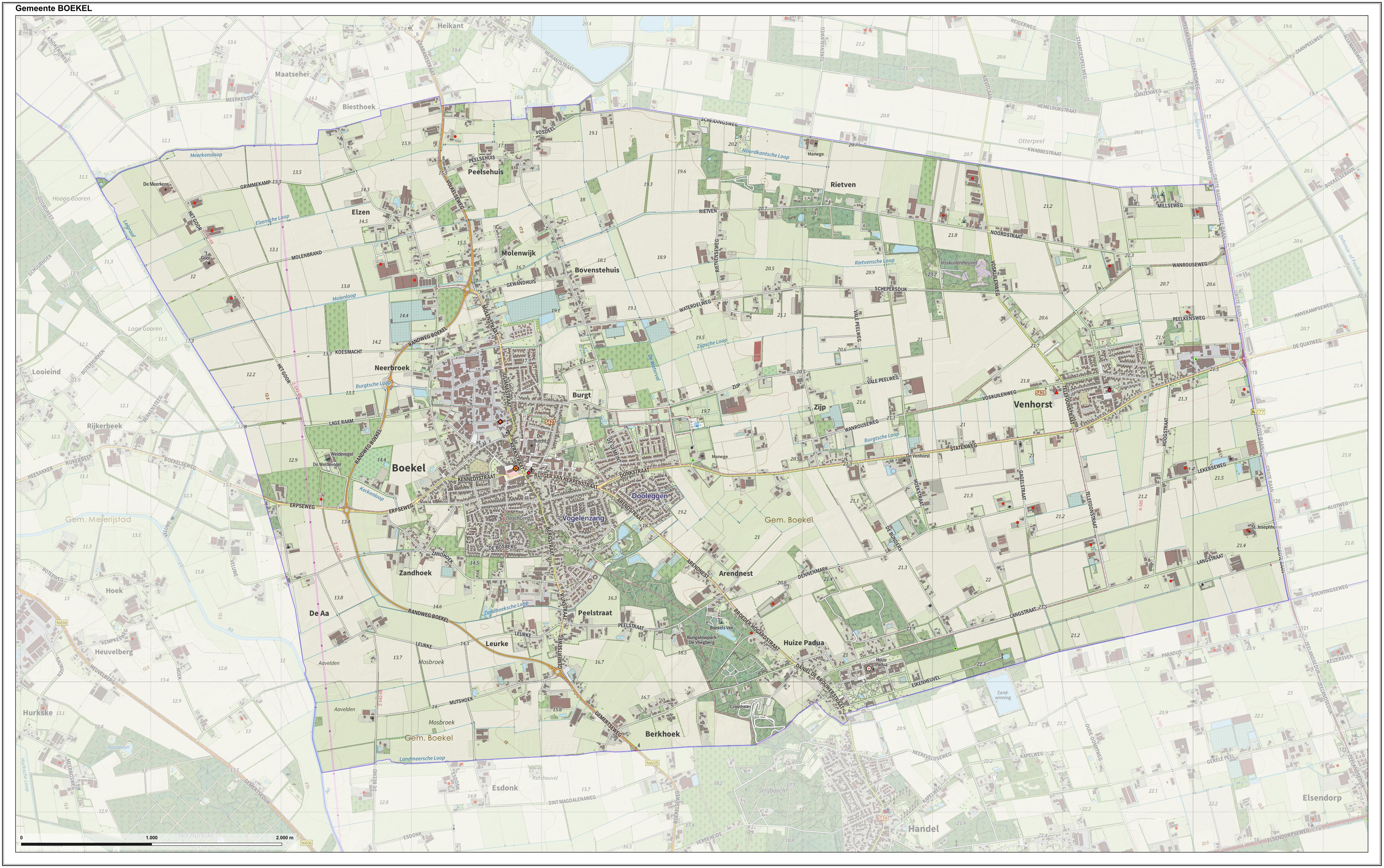 Topografische gemeentekaart. Resolutie: 400 pixels/km. Kaartbeeld samengesteld uit de open geodata van de Top10NL en Top25namen (Kadaster), Creative Commons-BY licentie. Gebouwvlakken uit open geodata BAG extract. Wegen uit de OpenStreetMap, OpenStreetMap community. Reliëfschaduw uit de Actuele Hoogtekaart AHN2. Samenstelling en kleurenschema: Jan-Willem van Aalst, met QGIS. Zie ook de Legenda.